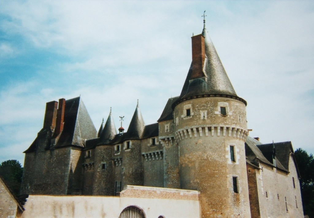 Château de Fougères-sur-Bièvre (France)